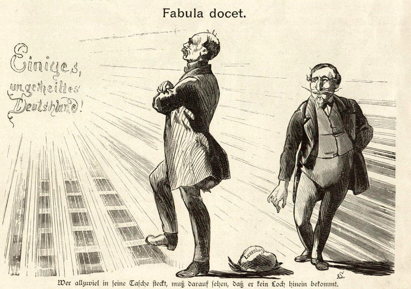 Bismarck-Album des Kladderadatsch. "Fabula docet." Karikatur auf Bismarck, der dem einigen Deutschland entgegenblickt, während Napoleon III. auf Luxemburg schielt.